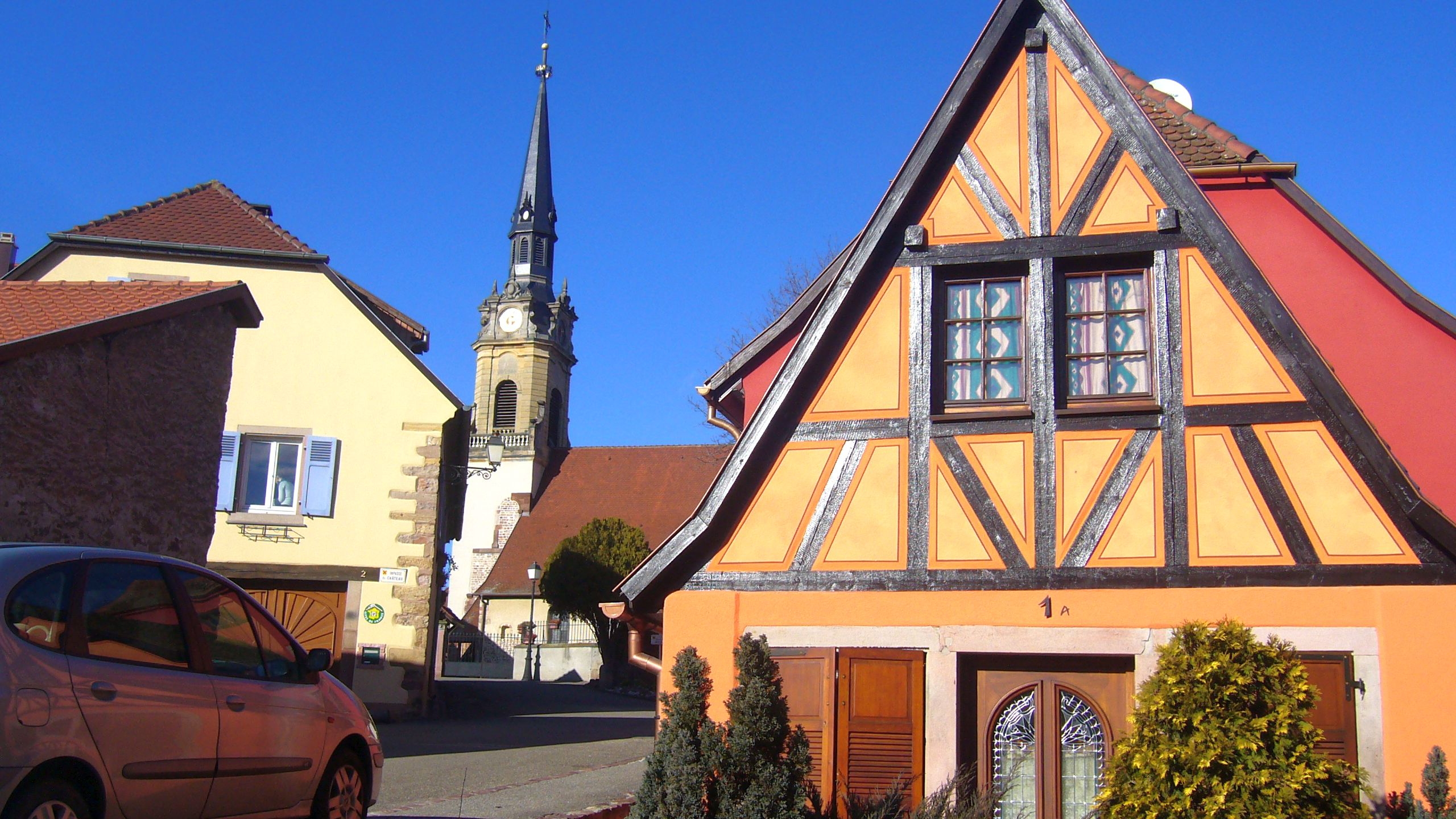 Eglise Sainte Colombe à Hattstatt (Haut-Rhin)